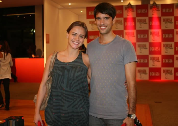 Acompanhada pelo marido, a atriz Juliana Silveira, que está grávida de 5 meses, foi retirar a camiseta que dá acesso ao camarote.